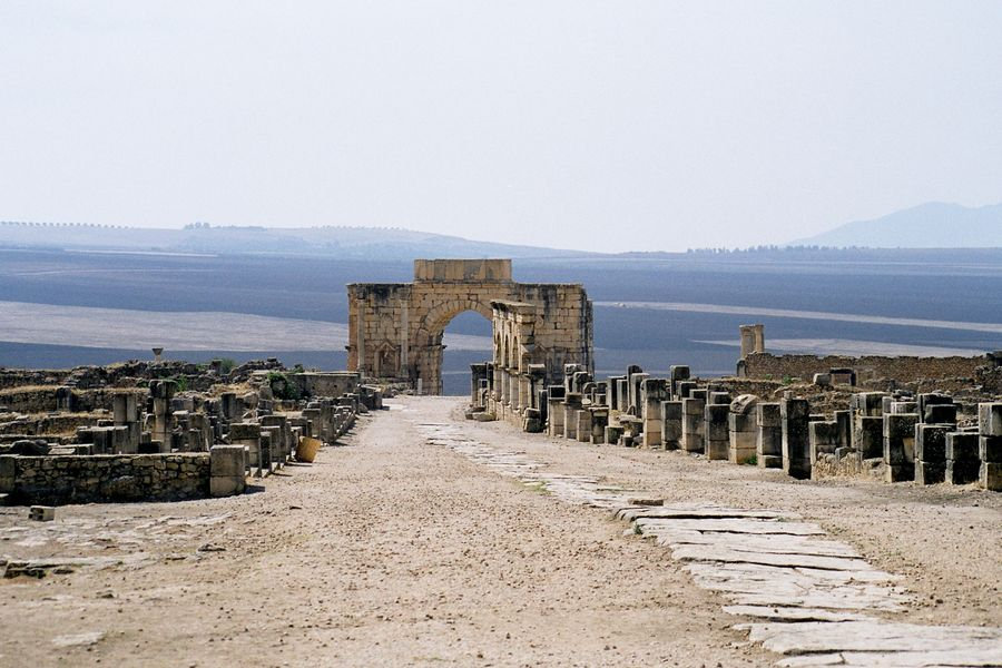 Volubilis